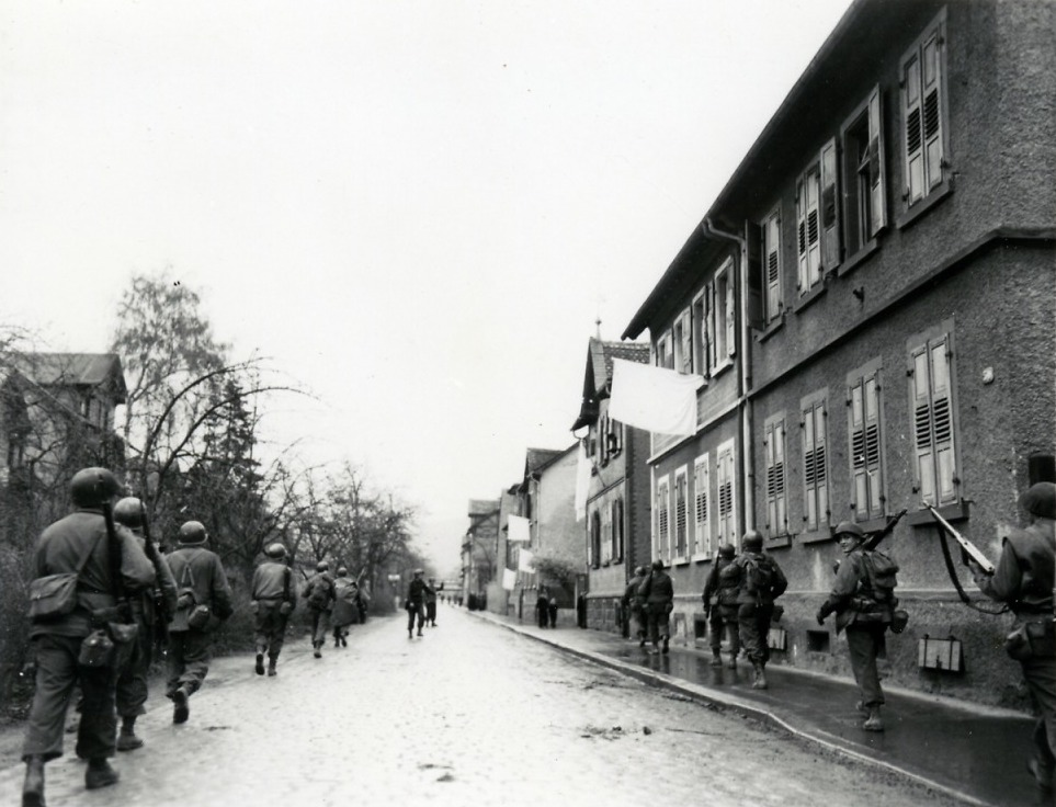 Einmarsch des 180. Infanterie-Regiments der 45. Division der US Amry am 27. März 1945 in Bensheim durch die damalige Horst-Wessel-Straße, heute Schwanheimer Straße. Aus den Fenstern hängen weiße Fahnen/Tücher zum Zeichen der Kapitulation.